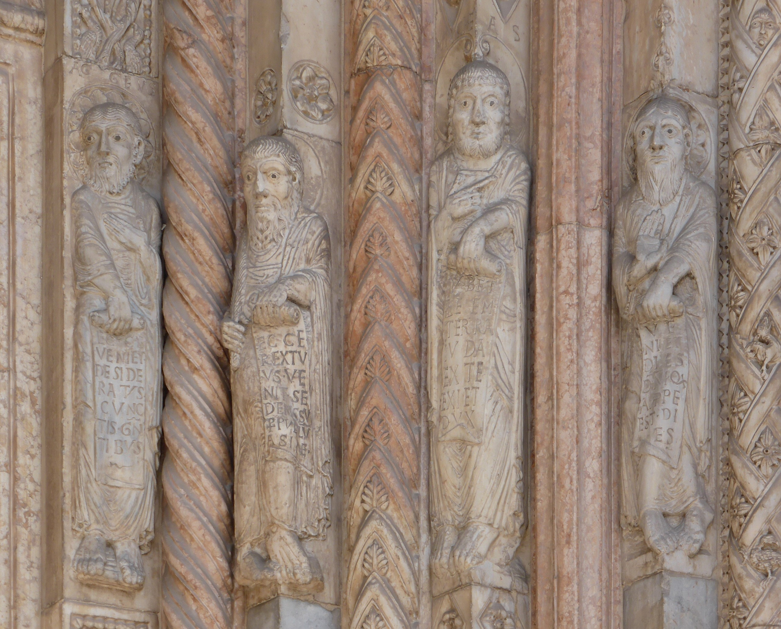 Domkomplex Verona, Detail des romanischen Hauptportals: Propheten des Alten Testaments